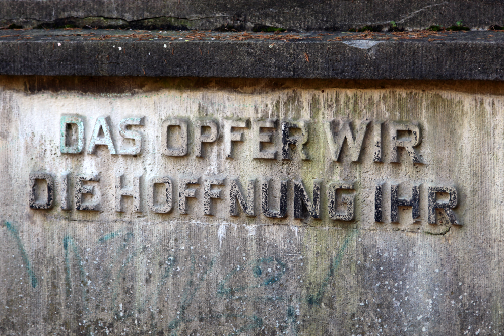 Kriegerdenkmal für die Gefallenen des Ersten Weltkriegs in Radeberg, Zustand 2014